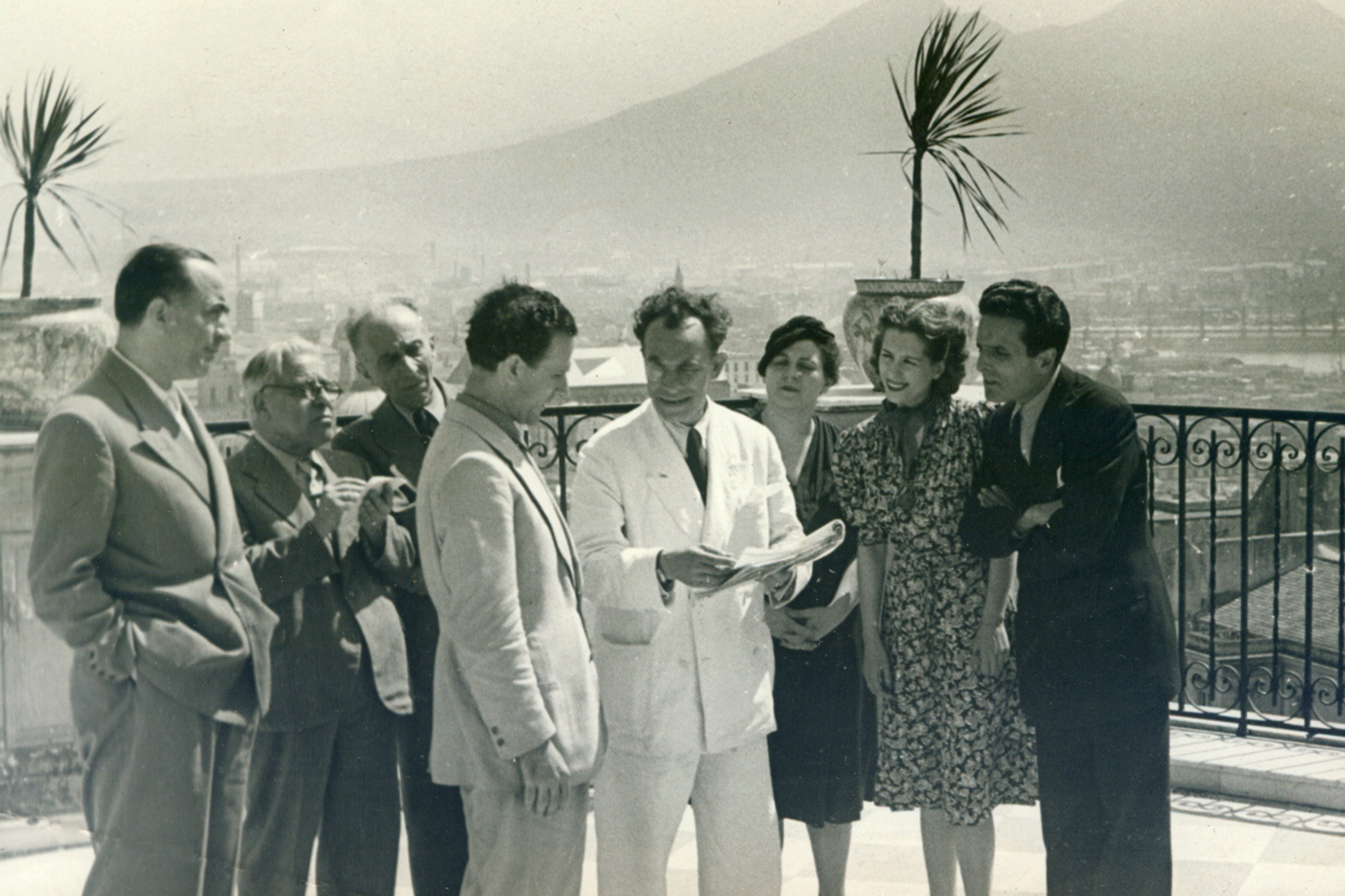 Foto di mia proprietà di una prova di Viviani sul terrazzo della casa di napoli